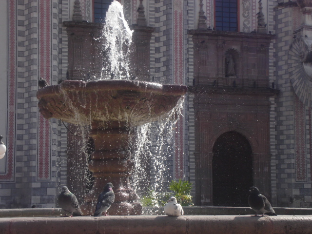 fuente enfrente del Templo de Santa Rosa — Santiago de Querétaro, Municipo de Querétaro, Querétaro (estado), México.